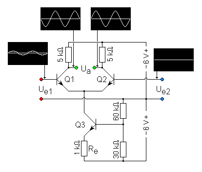 Prinzip eines Differenzverstärkers